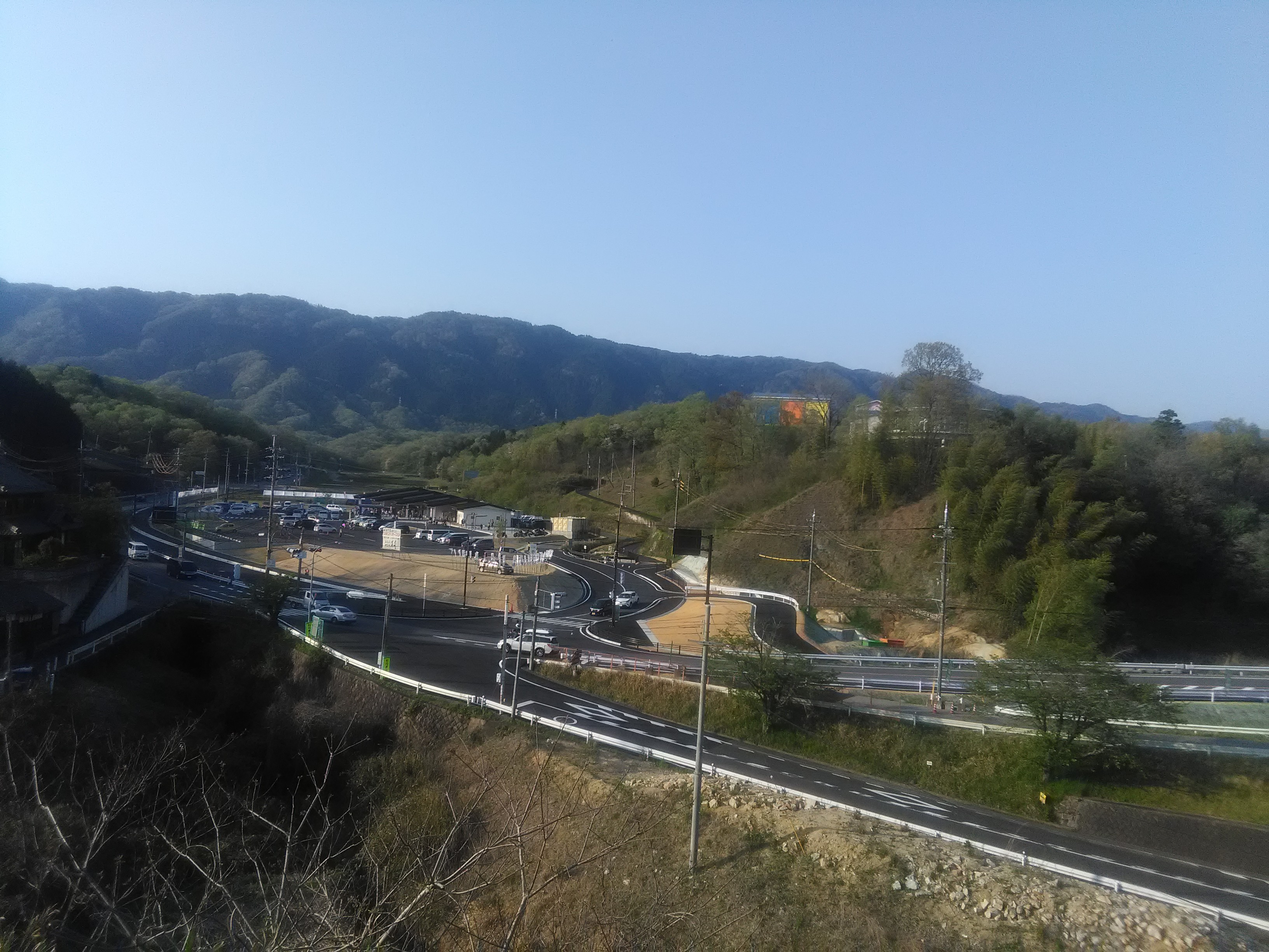 道の駅お茶の京都みなみやましろ村。月ケ瀬口駅下りホームより。